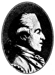 Gustaf Ribbing (1719-1803).